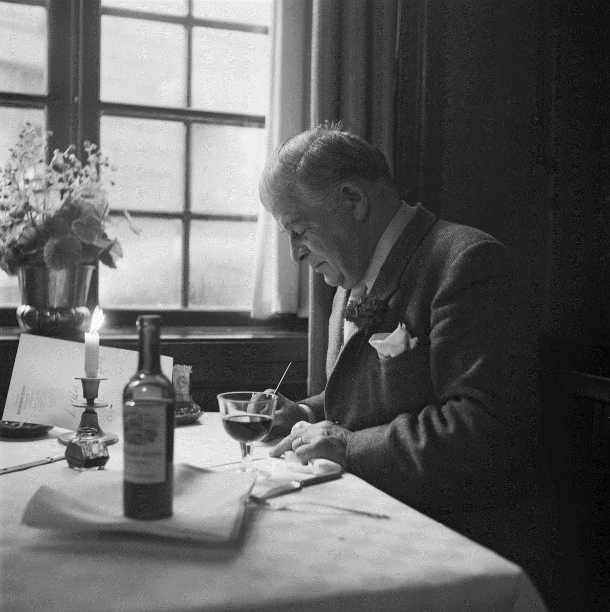 Evert Taube sitter vid sitt stambord på restaurang Den Gyldene Freden i Gamla stan, Stockholm.